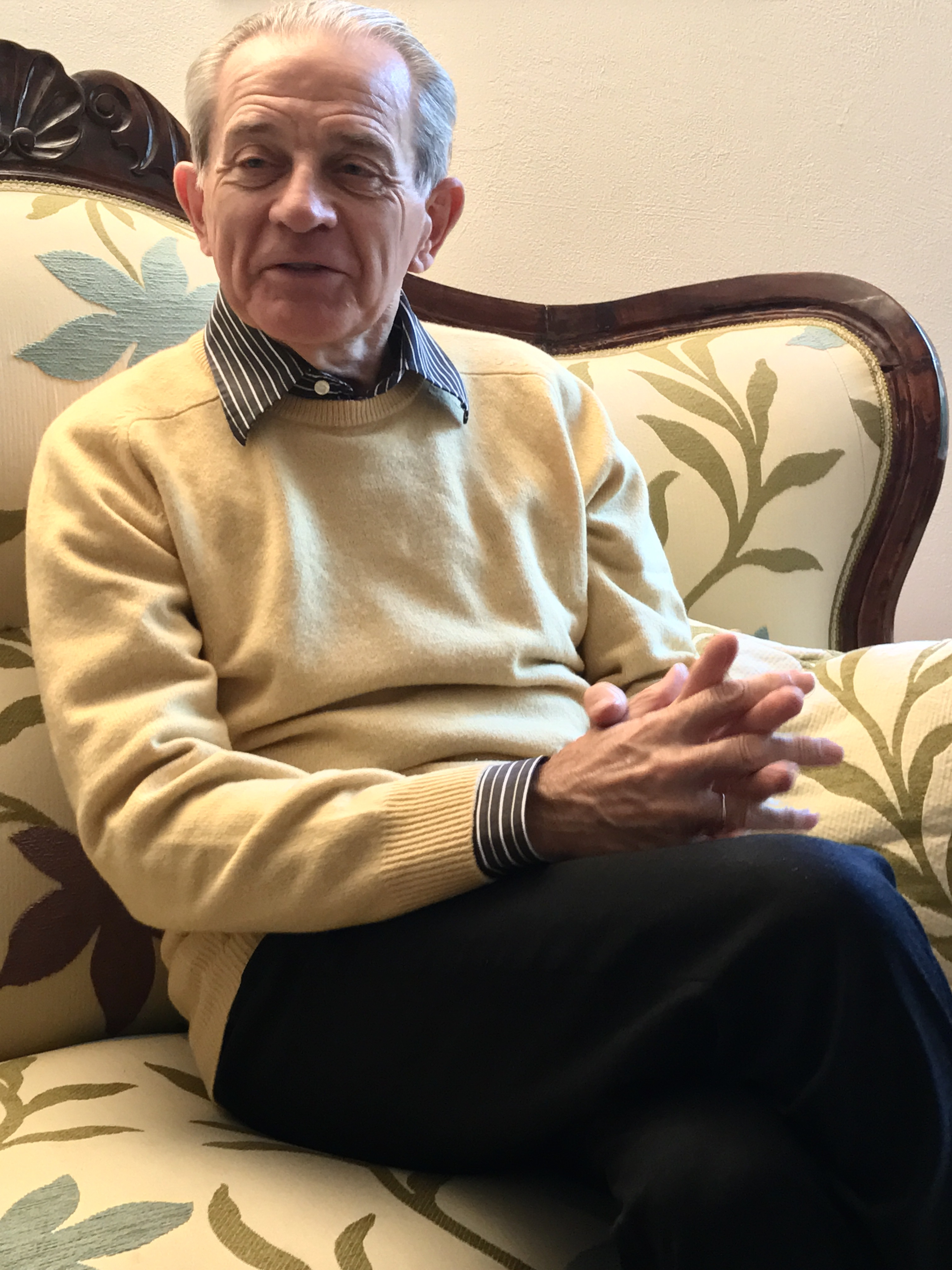 von der Familie gewidmet